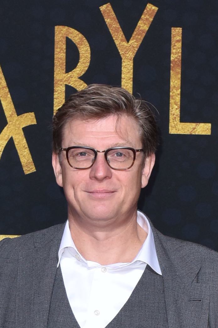 Hendrik Handloegten auf der Premiere von "Babylon Berlin" im Berliner Ensemble Agency People Image (c.) Daniel Hinz